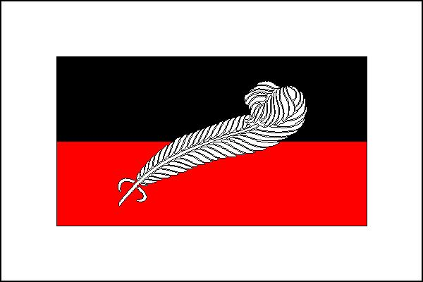 Vlajka obce Štoky